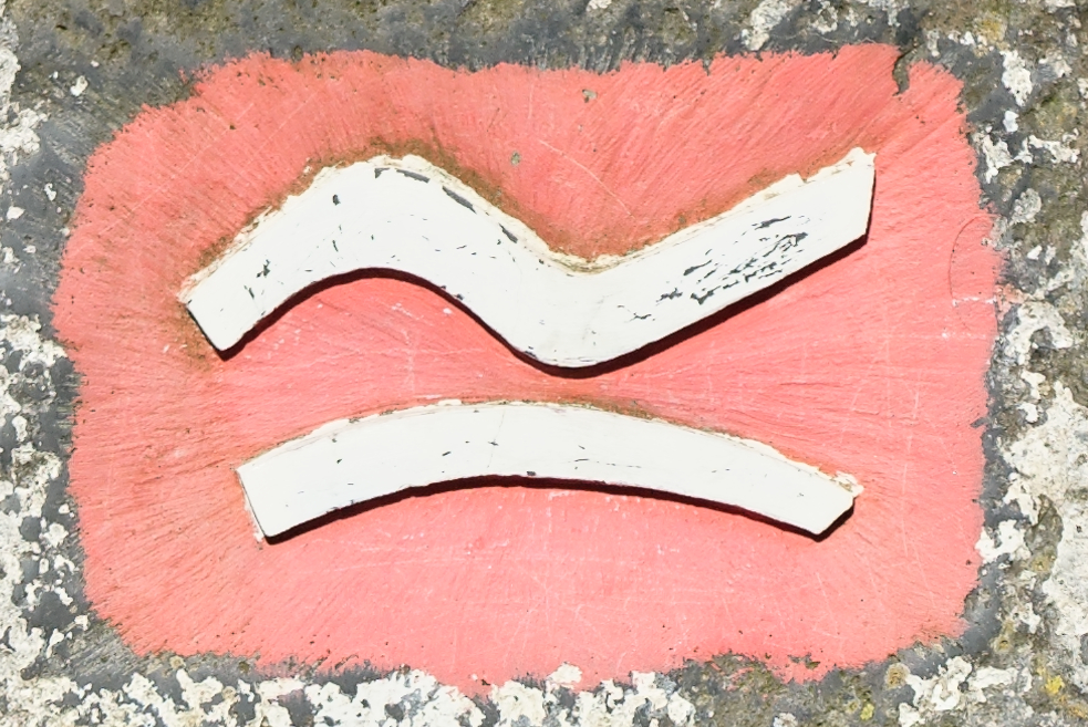 Logo des Rothaarsteigs am Rathaus Brilon